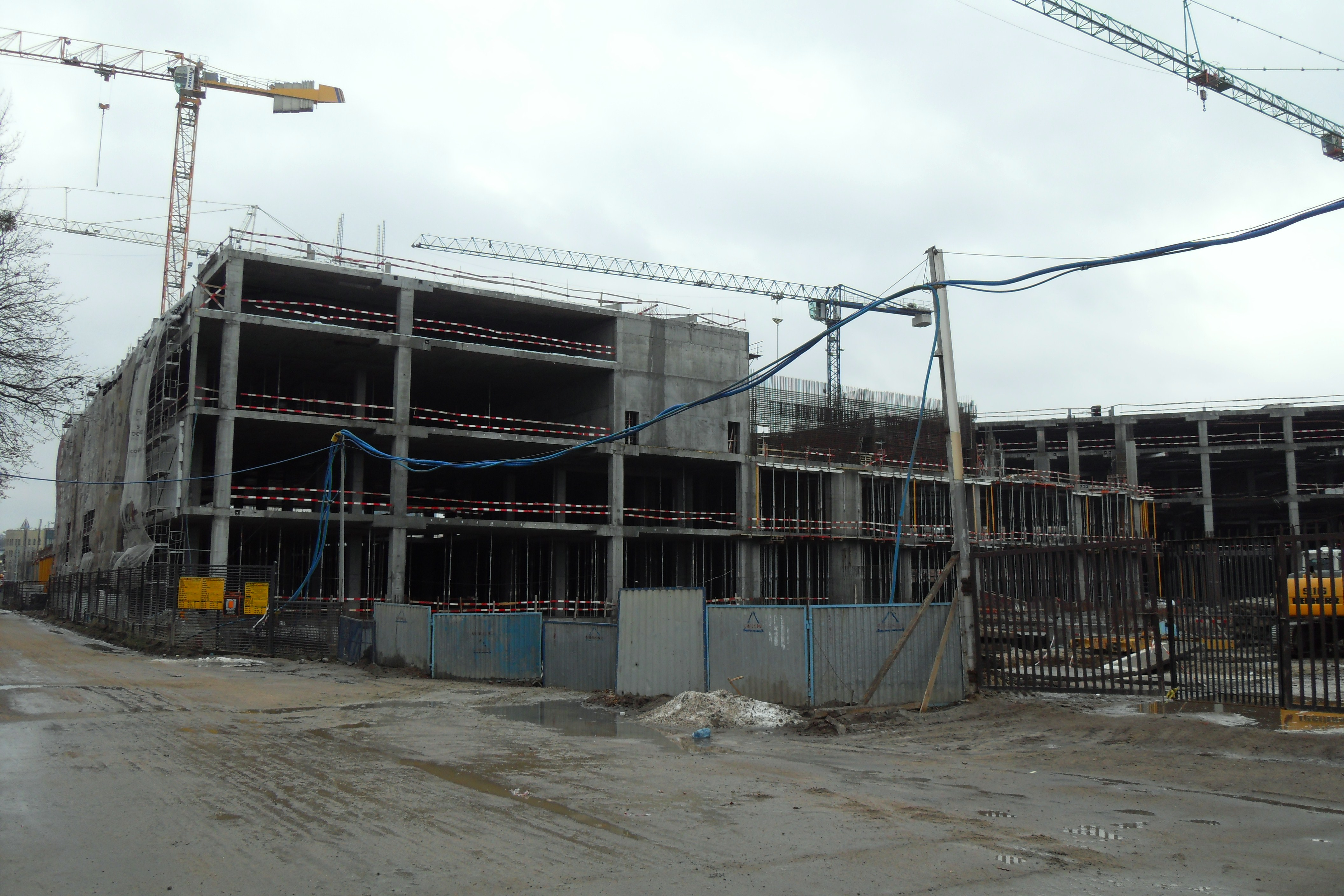 Gdańsk Wrzeszcz Dolny, ul. Kilińskiego. Galeria Metropolia w budowie, widok od strony ul. Nad Stawem.